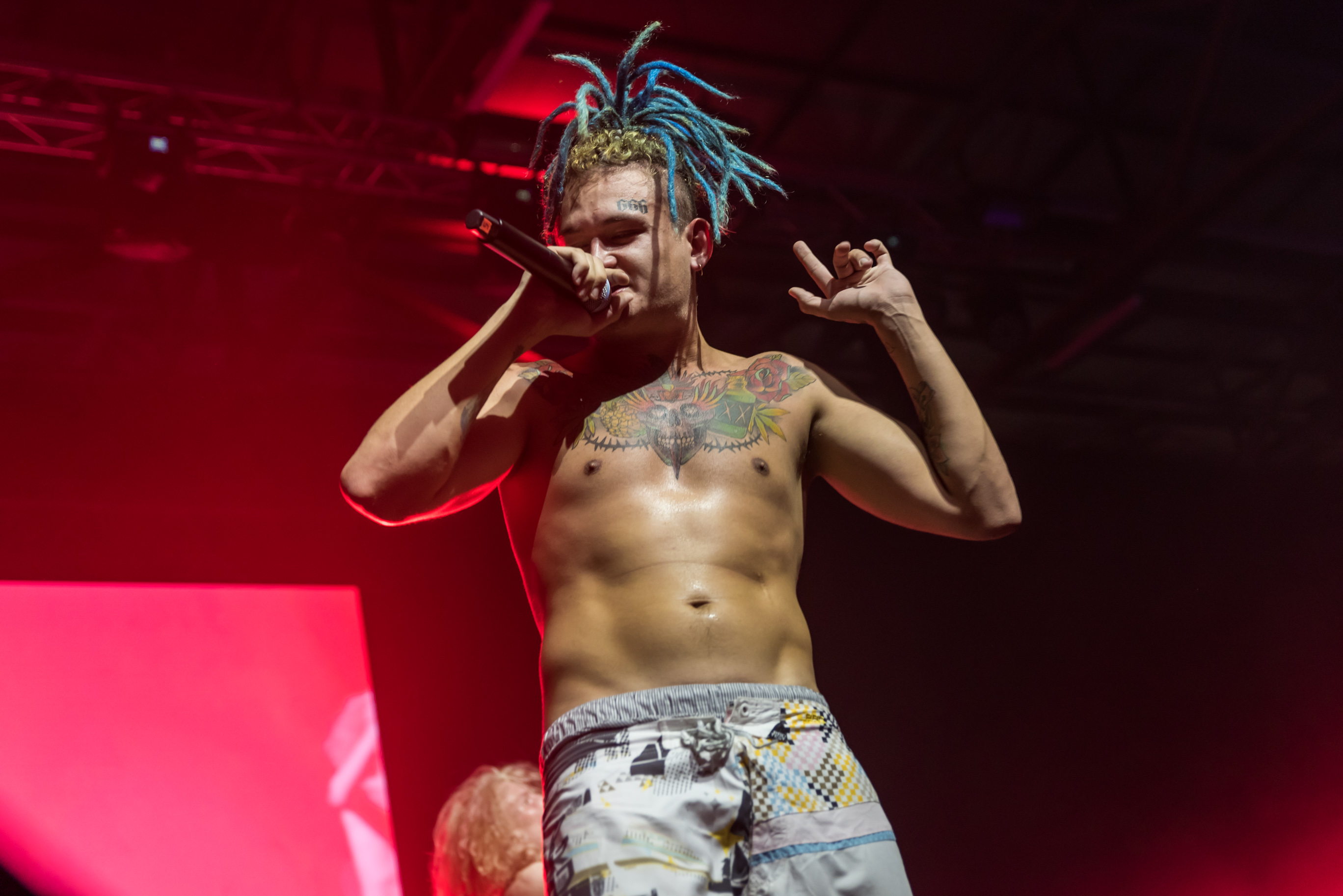 Morgenshtern на Видфест 2018 в Москве